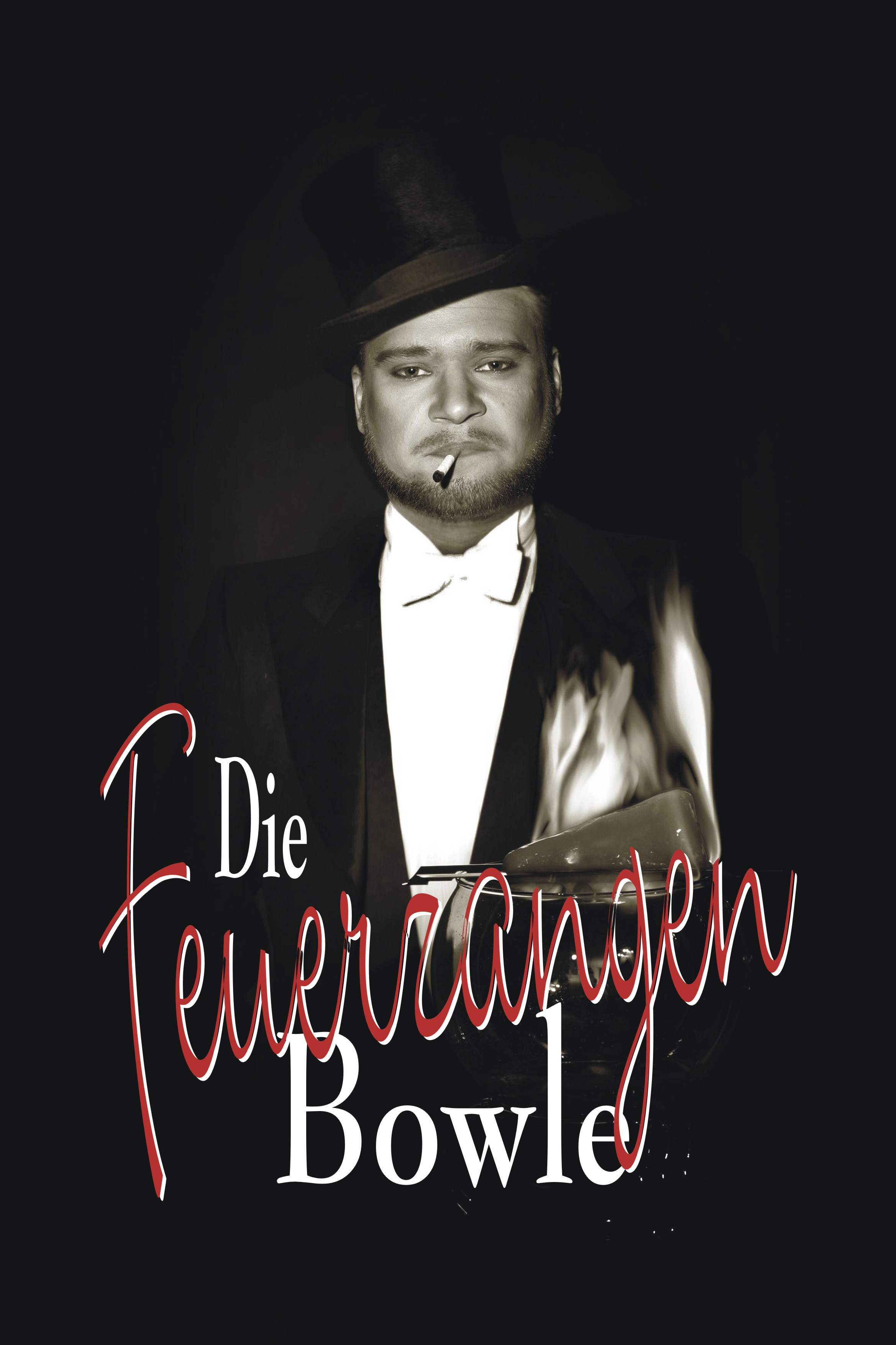 Logo-Design 2004 von "Die Feuerzangenbowle - Das Musical"